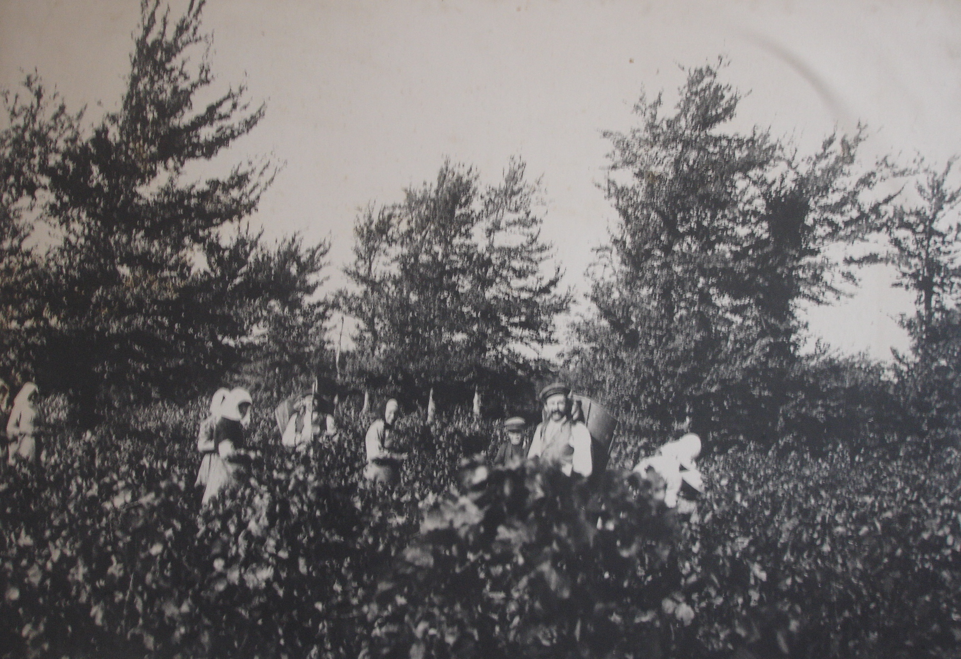 Vendange dans le département de l'Aude. Photo prise à l'exposition de l'abbaye de Caunes-Minervois